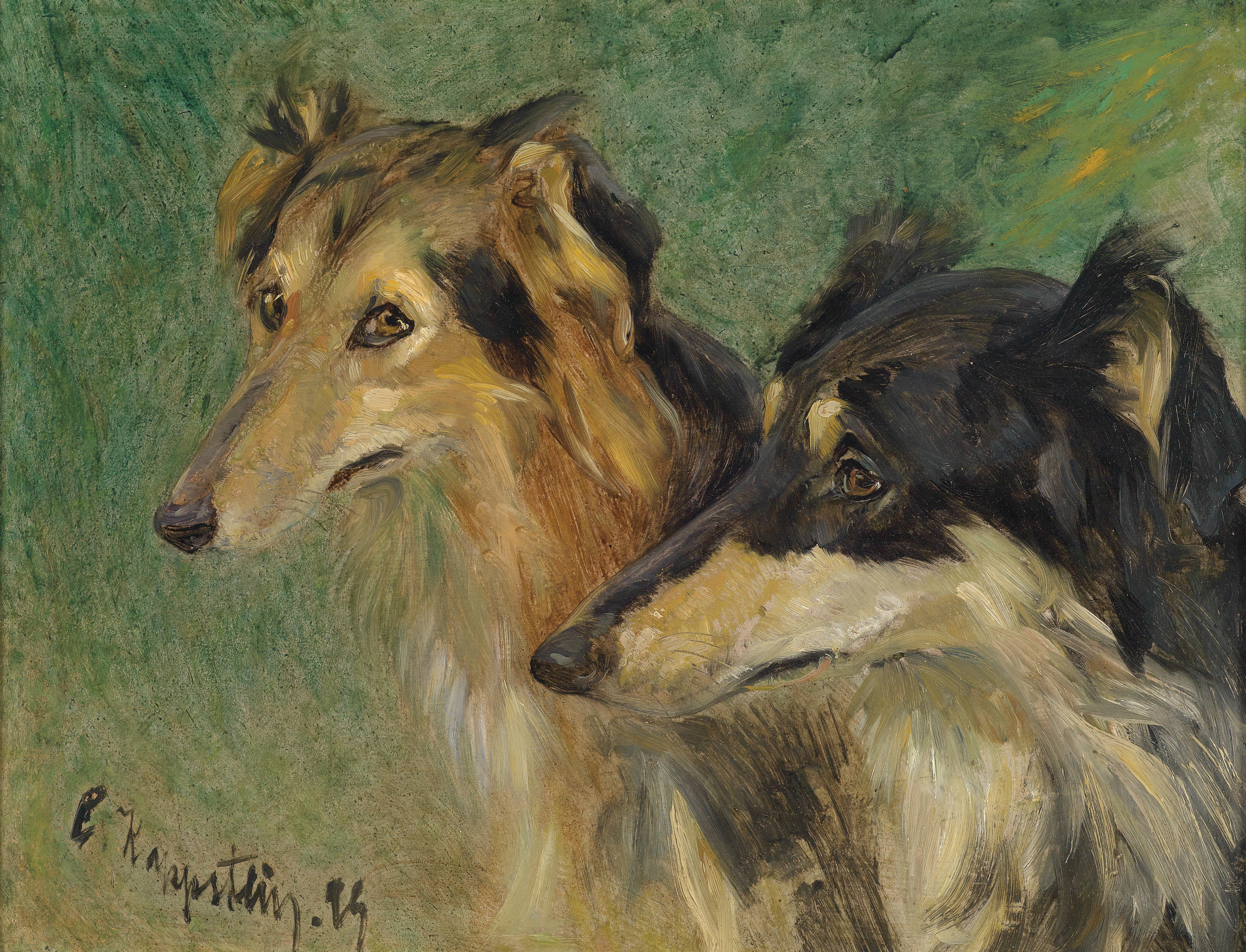 Portrait zweier Borzoj Hunde, signiert, datiert C. Kapstein (18)94, Öl auf Karton, 34,5 x 46 cm